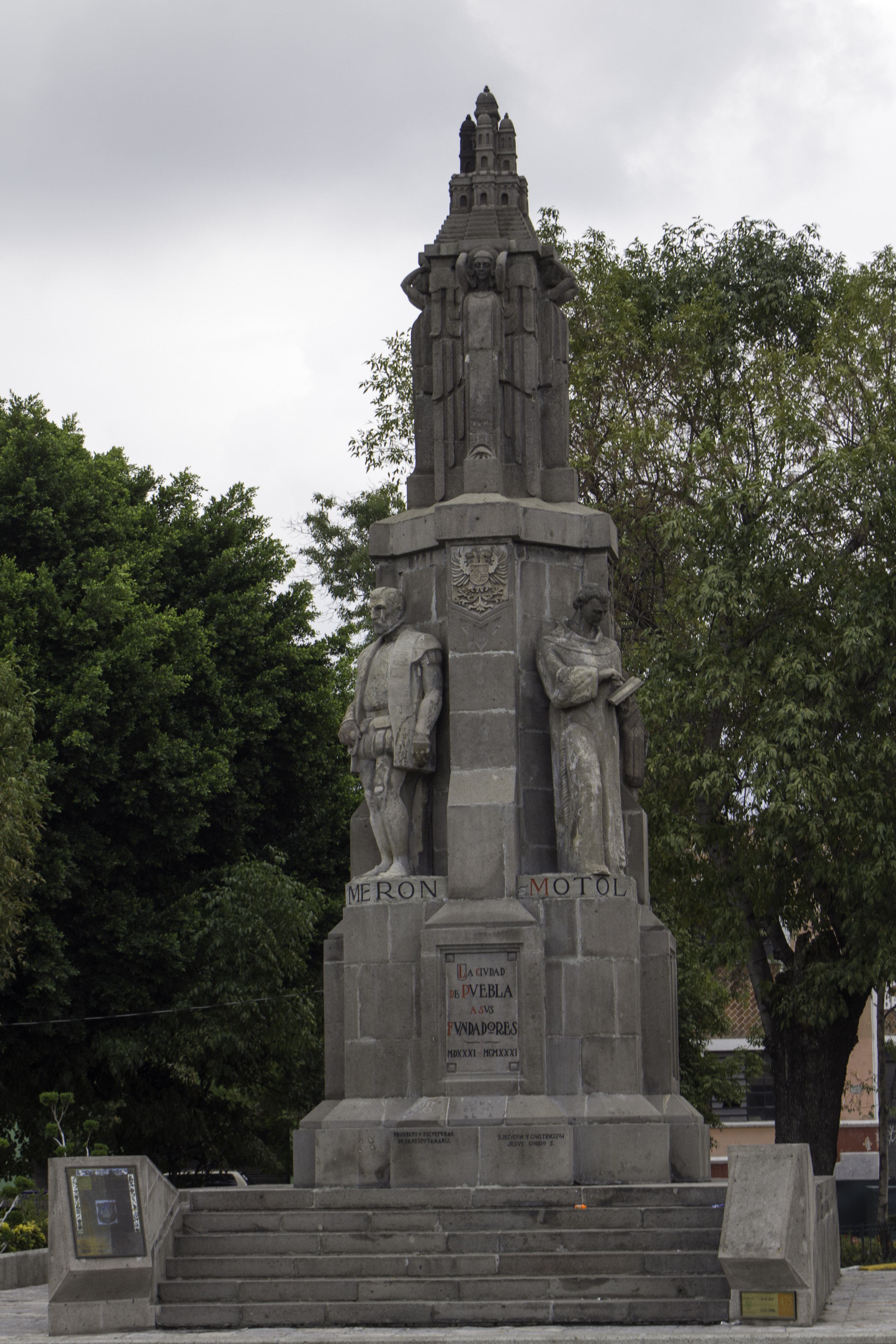 Monumento en Honor a Fundadores de Puebla en el Paseo de San Francisco